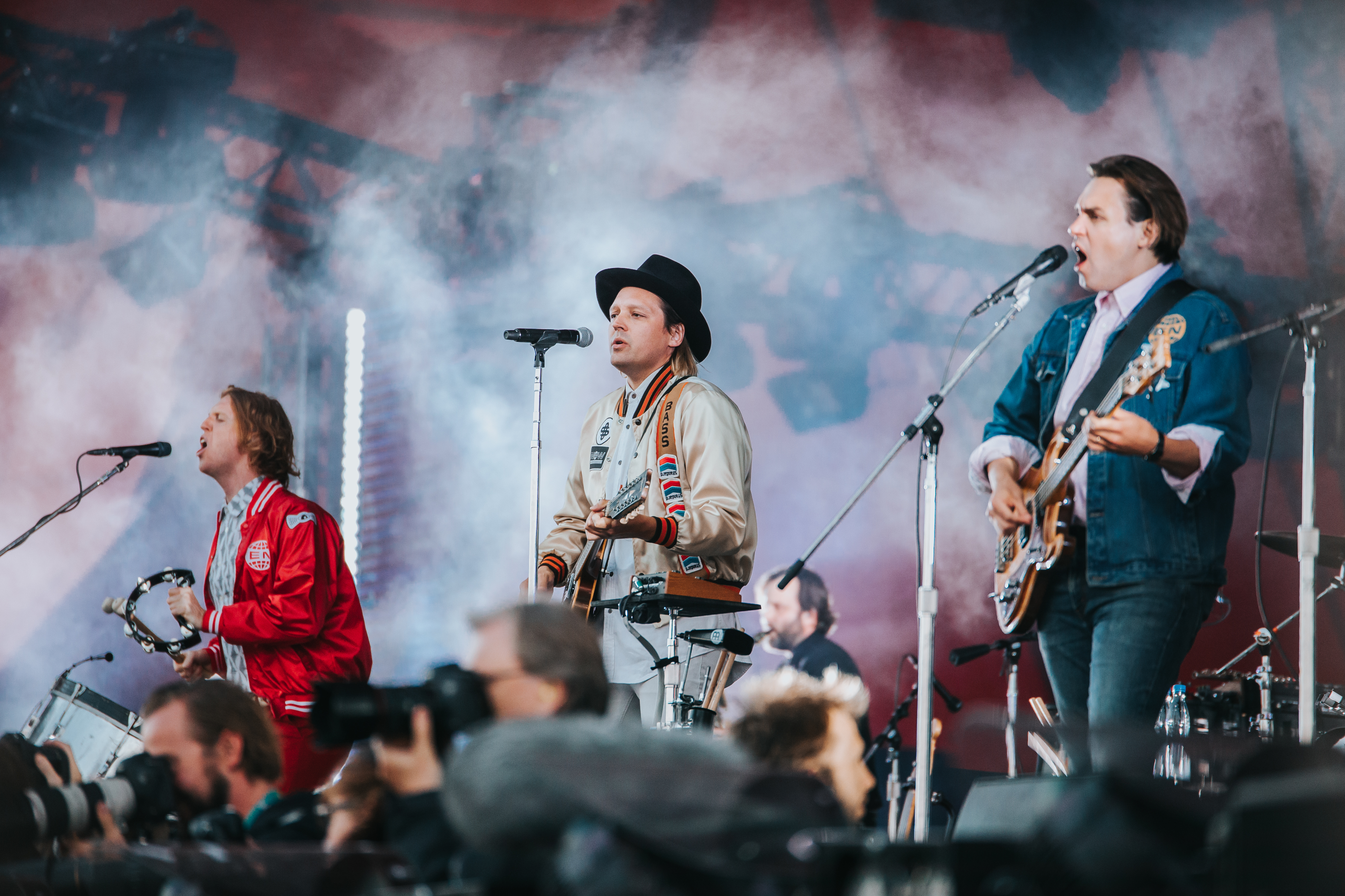 Photo: Krists Luhaers // @Kristsll